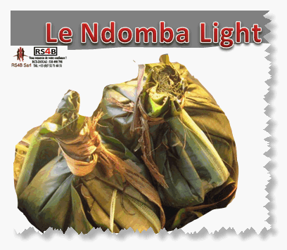 Poisson NDOMBA Light est une Spécialité Camerounaise des zone côtières riche en poissons. C'est une recette à base de Poisson d'épices et de piment(dosé selon les goûts). Généralement fait avec le poiusson d'eaux douces, le Ndomba reste un met très apprecié des élites, de tout le monde et des personnes aimant des plats forts épicés. Le Ndomba s'accompagne avec un bon vin blanc camerounais ou vin de palmes (encore appelé Le MATANGO) ou avec une bonne bière bien fraiche . Le Ndomba peut aussi s'appeler "NGWEYA" selon les régions du Cameroun... Il s'accompagne de légumes tactiquement assaisonnés et passés dans des feuilles de bananiers et minutieusement cuits pour une saveur enivrante. Le Ndomba reste un plat rare car fastidieux à réaliser car il faut savoir choisir son poisson et le nettoyer (voir RS4B sarl pour la suite sur This is an image of food from Cameroon